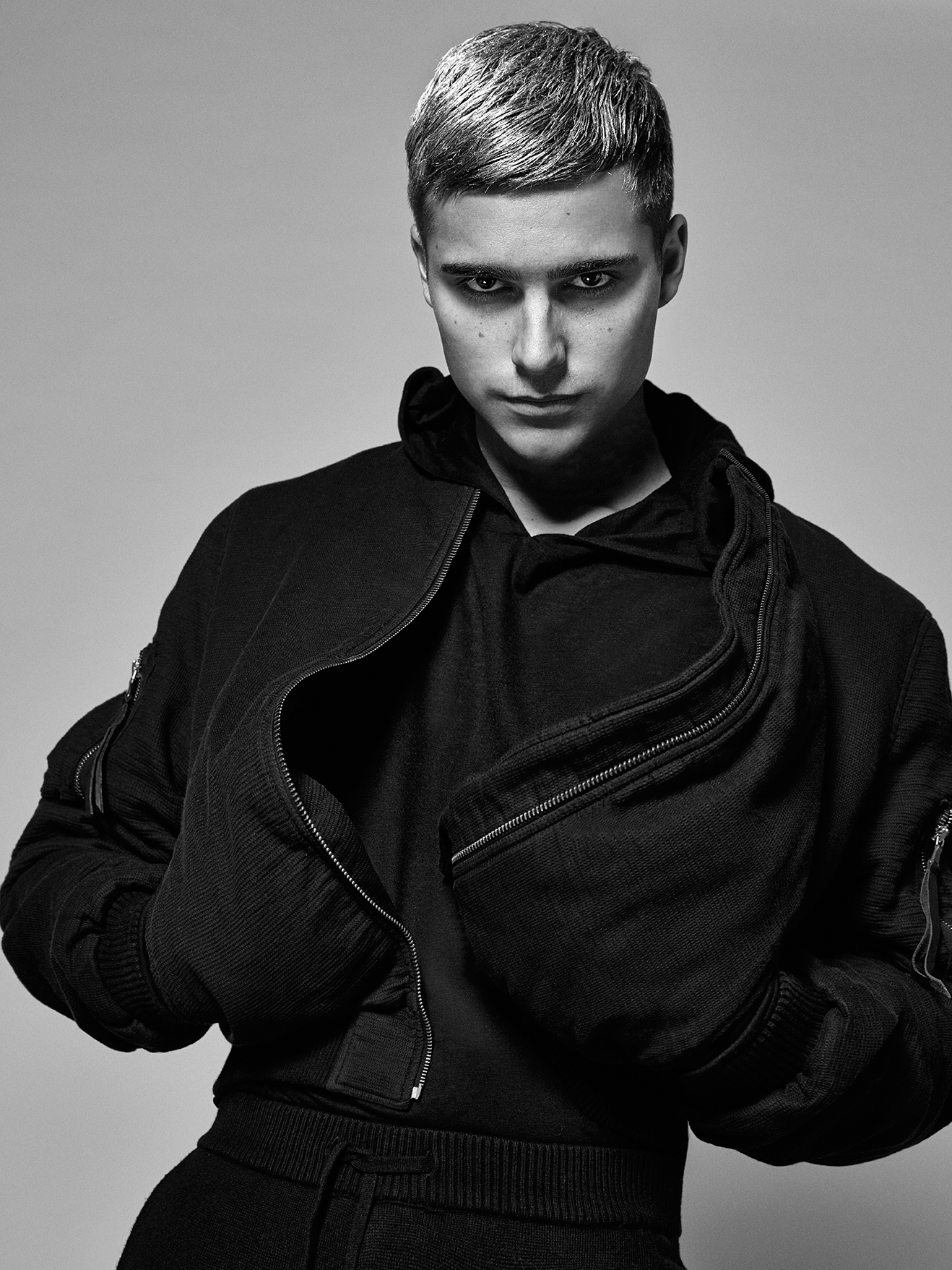 Artisten Eric Saade.